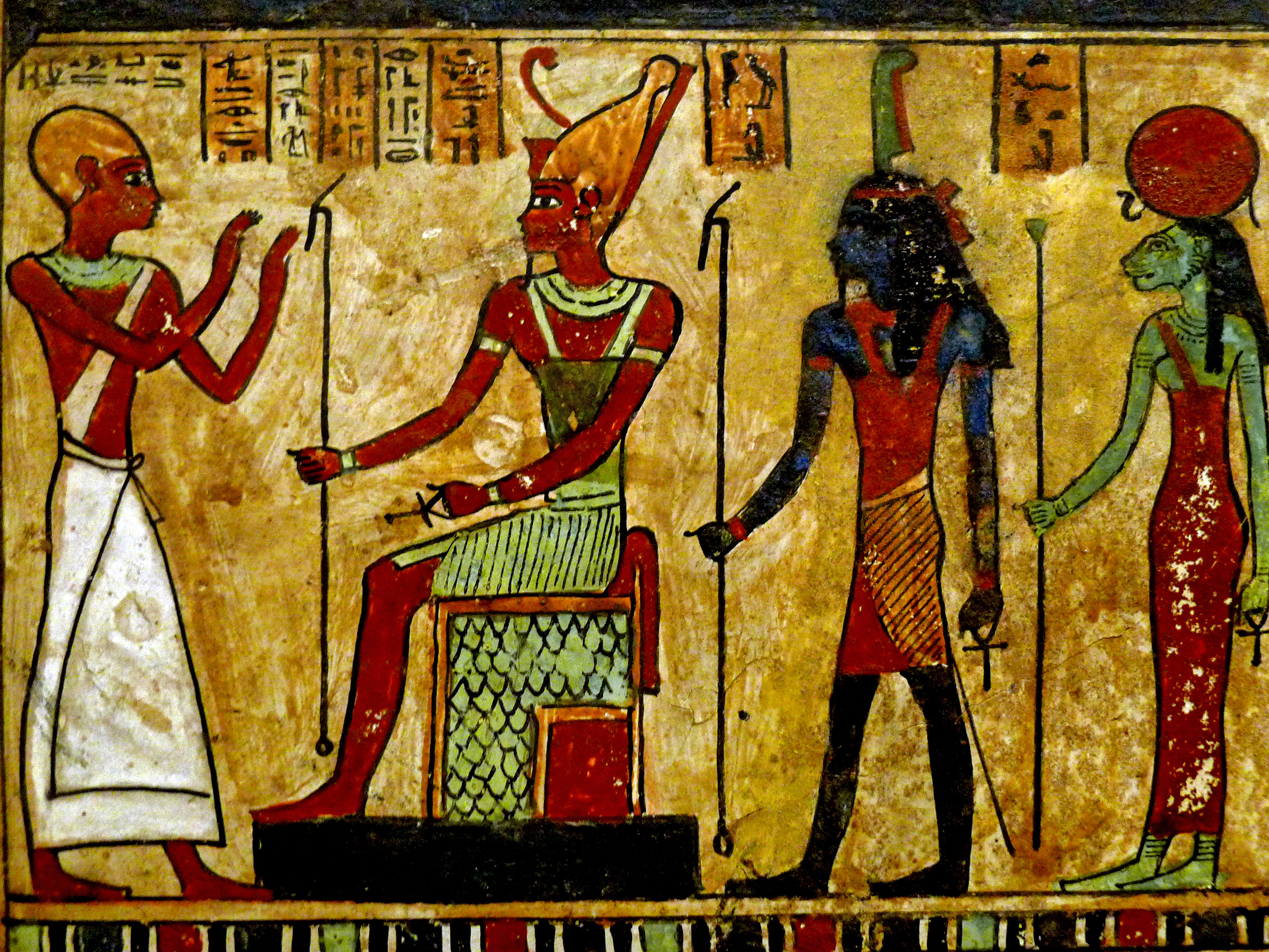 Image centrale gauche.